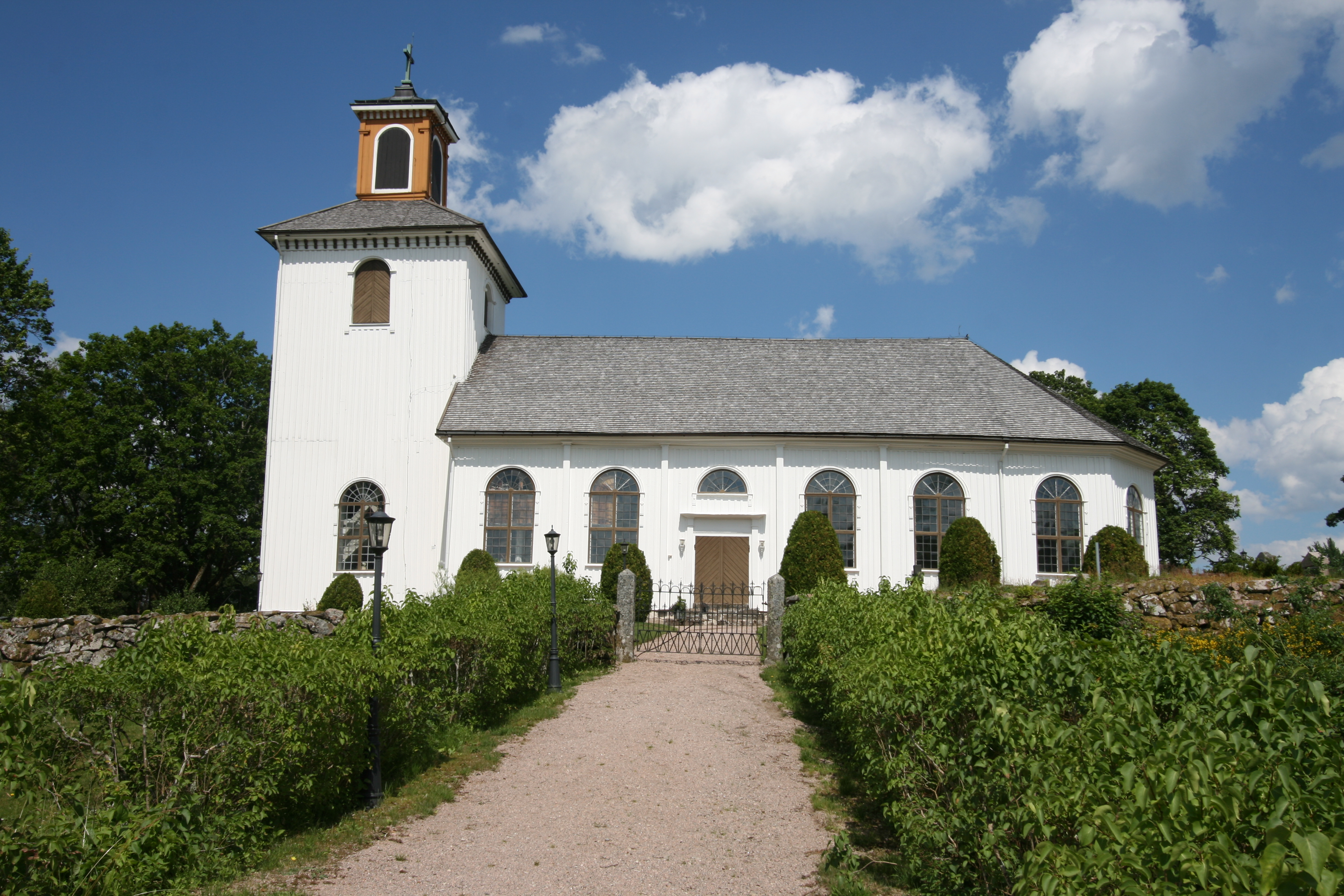 Skephults kyrka